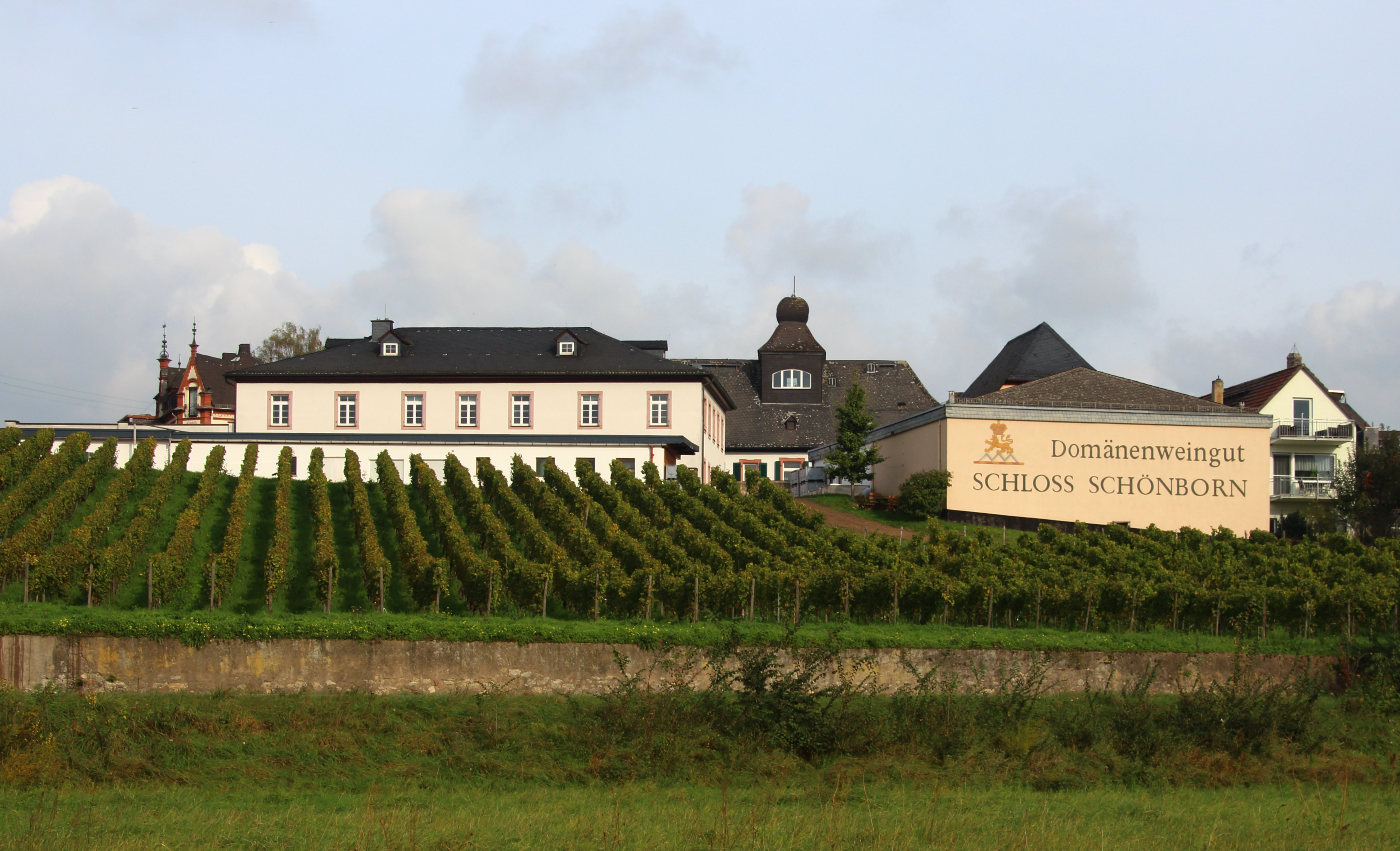 Domänenweingut Schloss Schönborn. Hauptstr. 51/53, Rheinseite. Hattenheim im Rheingau.